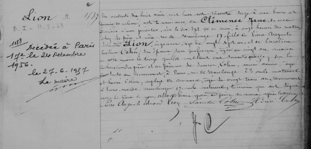 1876.08.17 - Acte de naissance de Clémence Jane LION